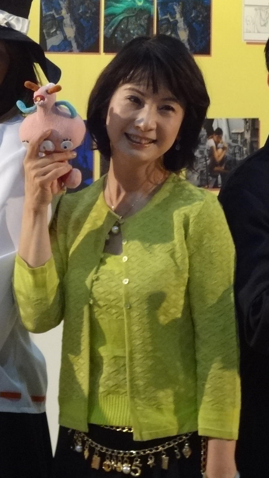 2013臺中動漫節，臺中市政府文化局局長葉樹姍。